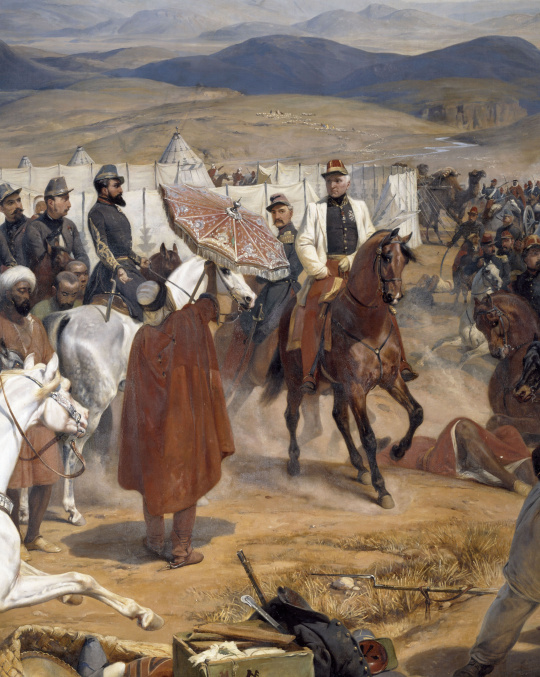 Mariscal Thomas-Robert Bugeaud y el Coronel Joseph Vantini. Obra de Vernet